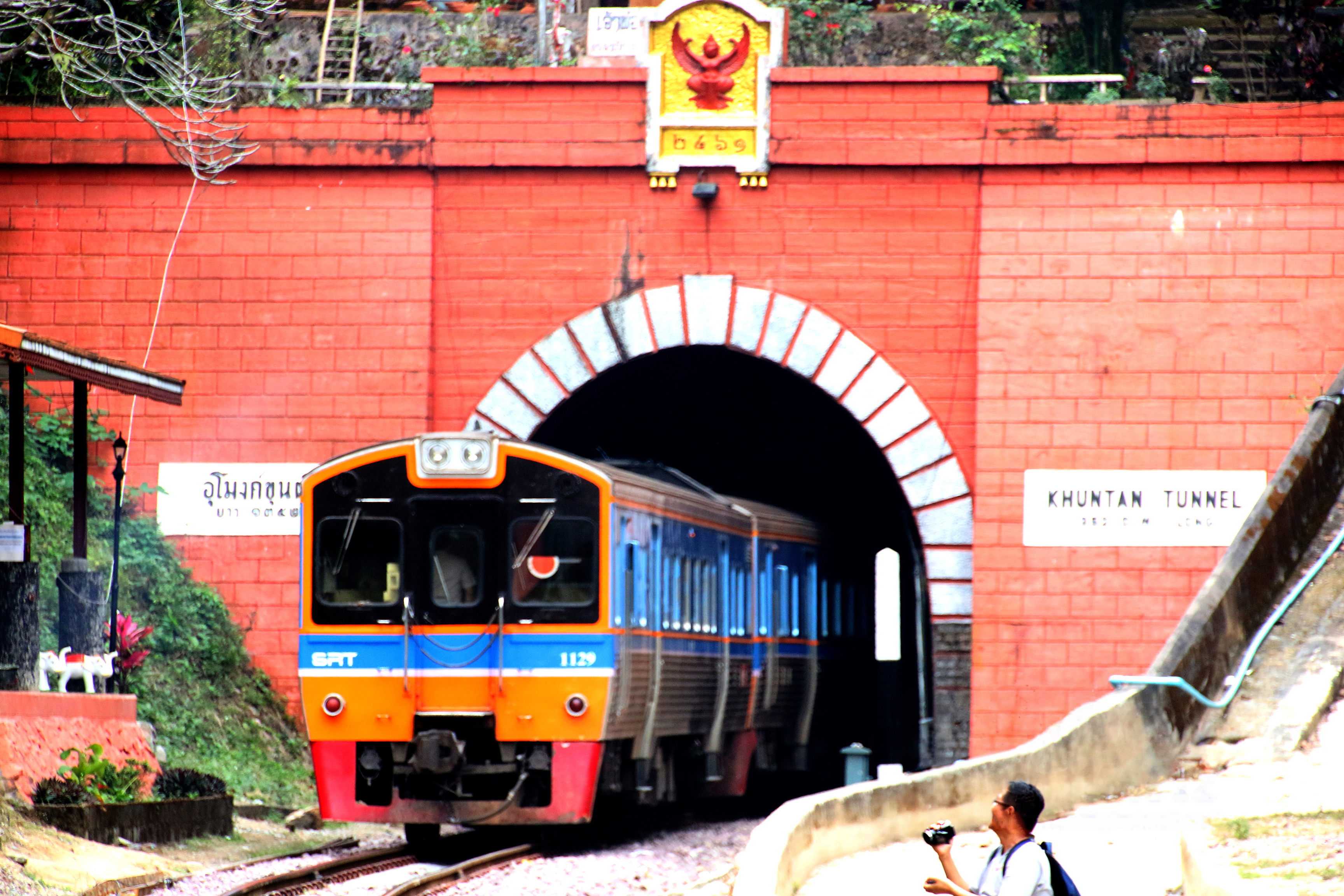 อุโมงค์ขุนตาน